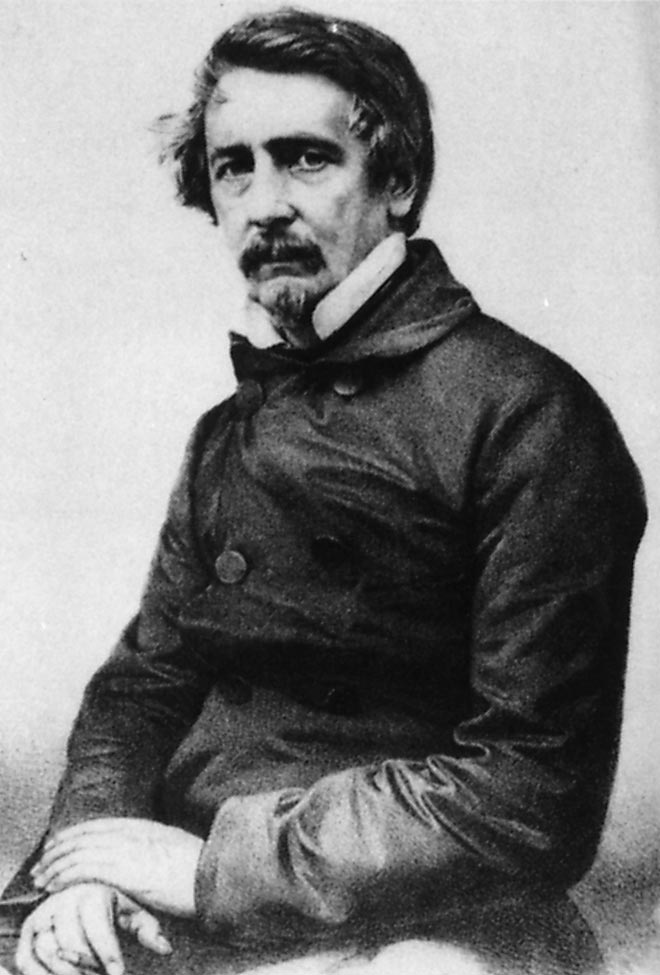 Louis Stromeyer (1804-1876), deutscher Chirurg und Generalarzt